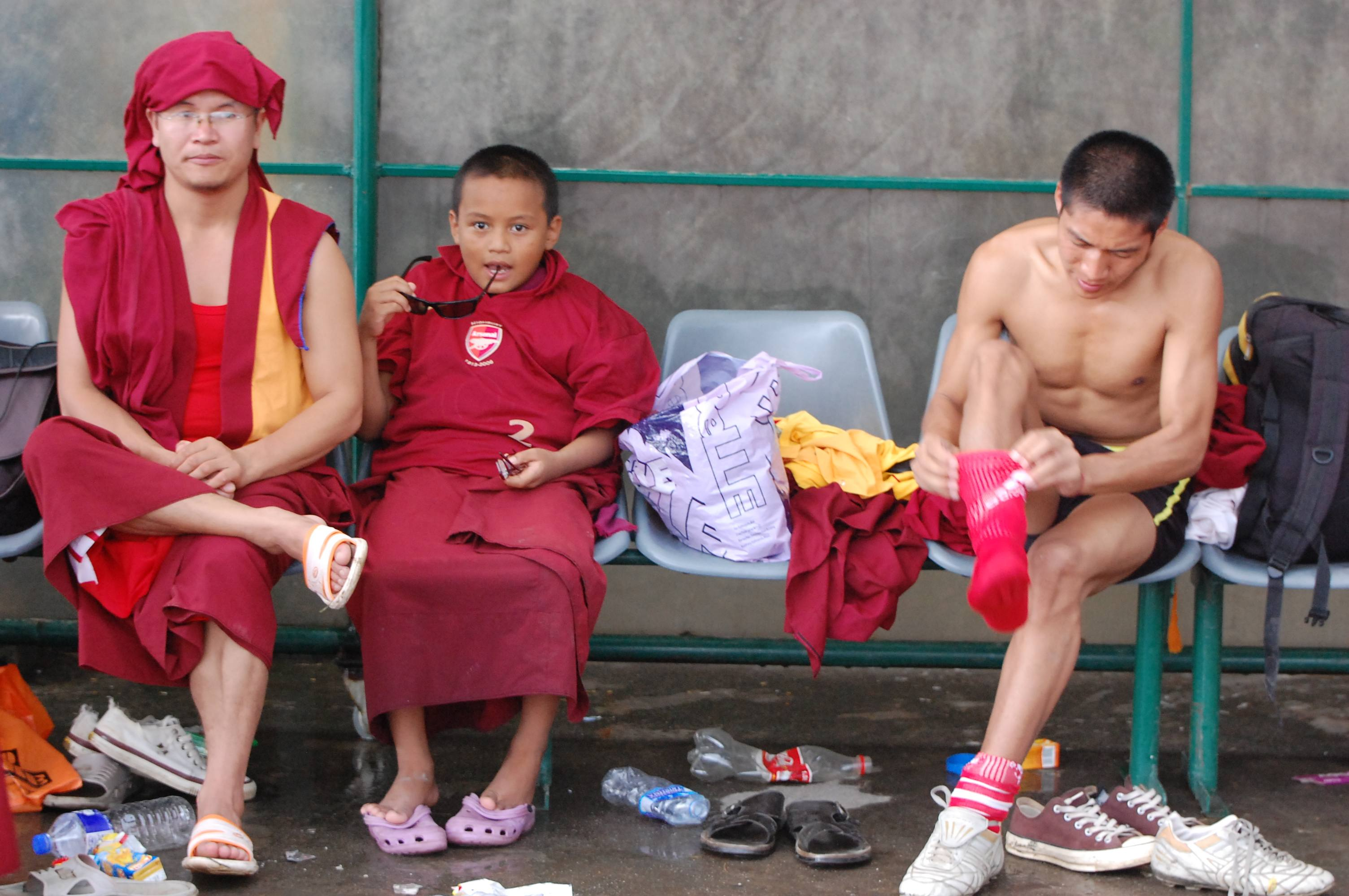 תמונה מהסרט חדרה הלבשה